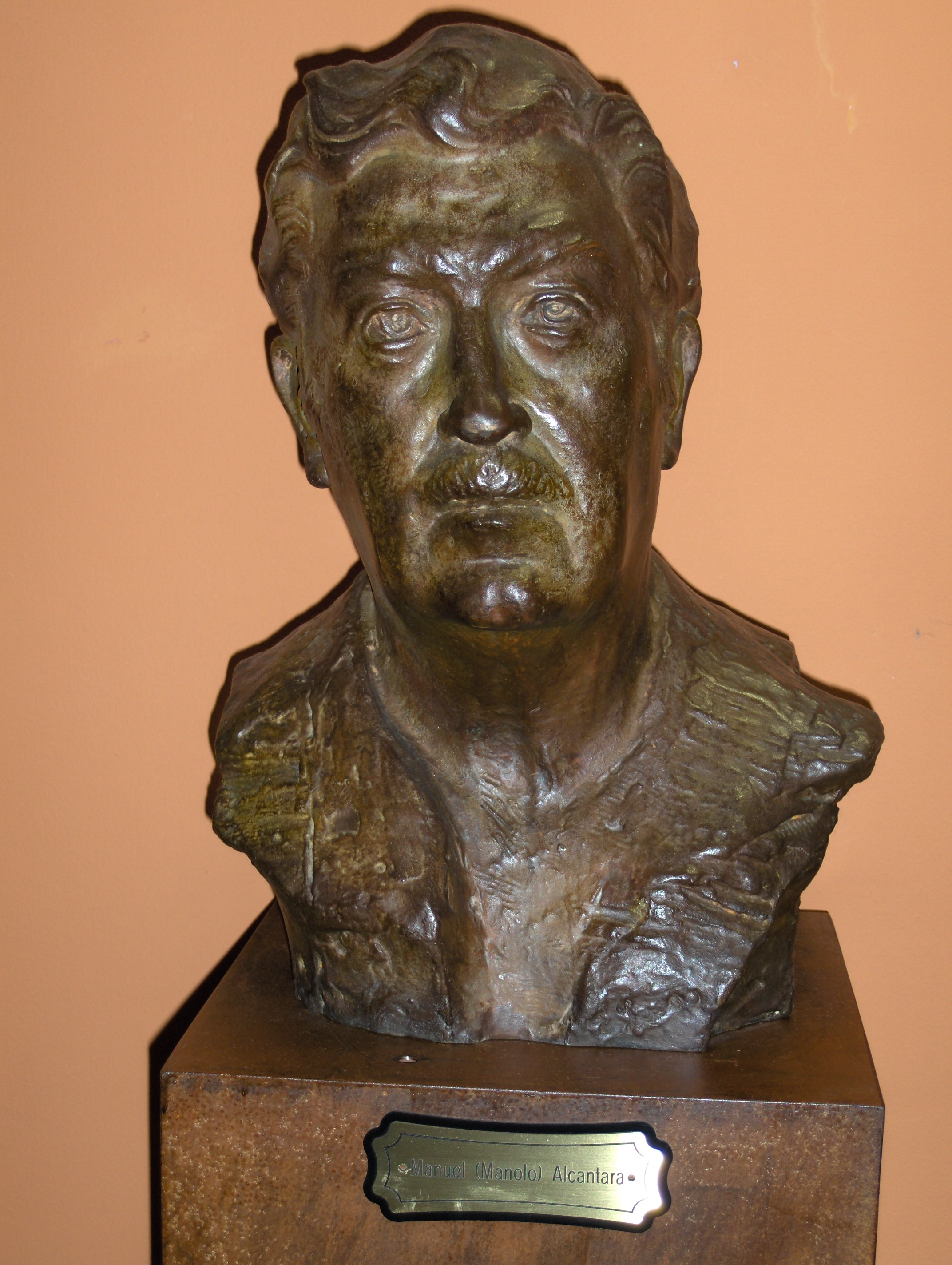 Busto de Manuel Alcántara, Palacio de Exposiciones de Estepona, Málaga, España.